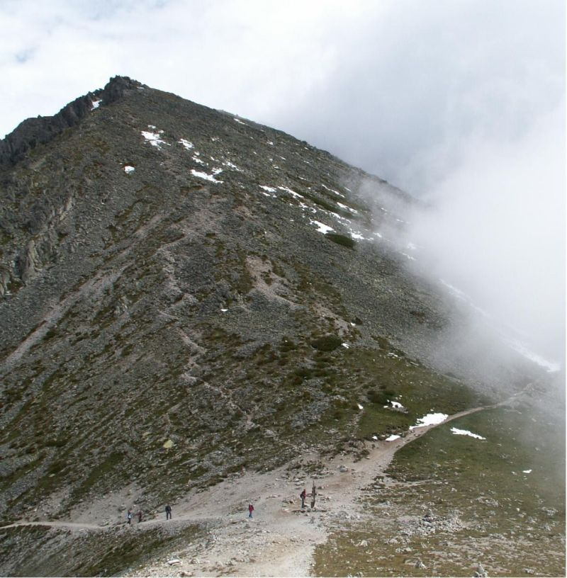 Przełęcz pod Osterwą (sedlo pod ostrvou), widok z Osterwy